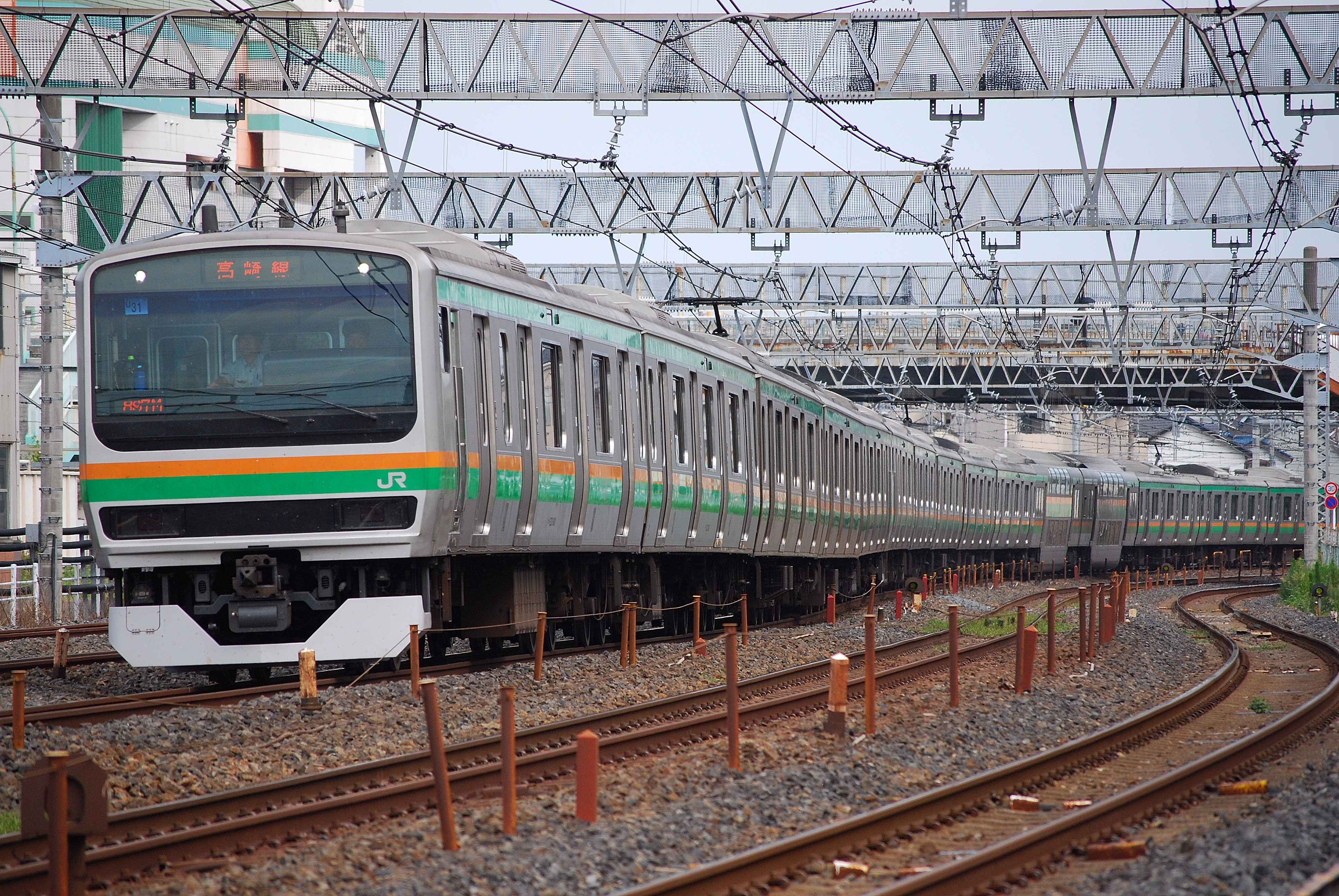 E231系（東北本線 赤羽～浦和間）